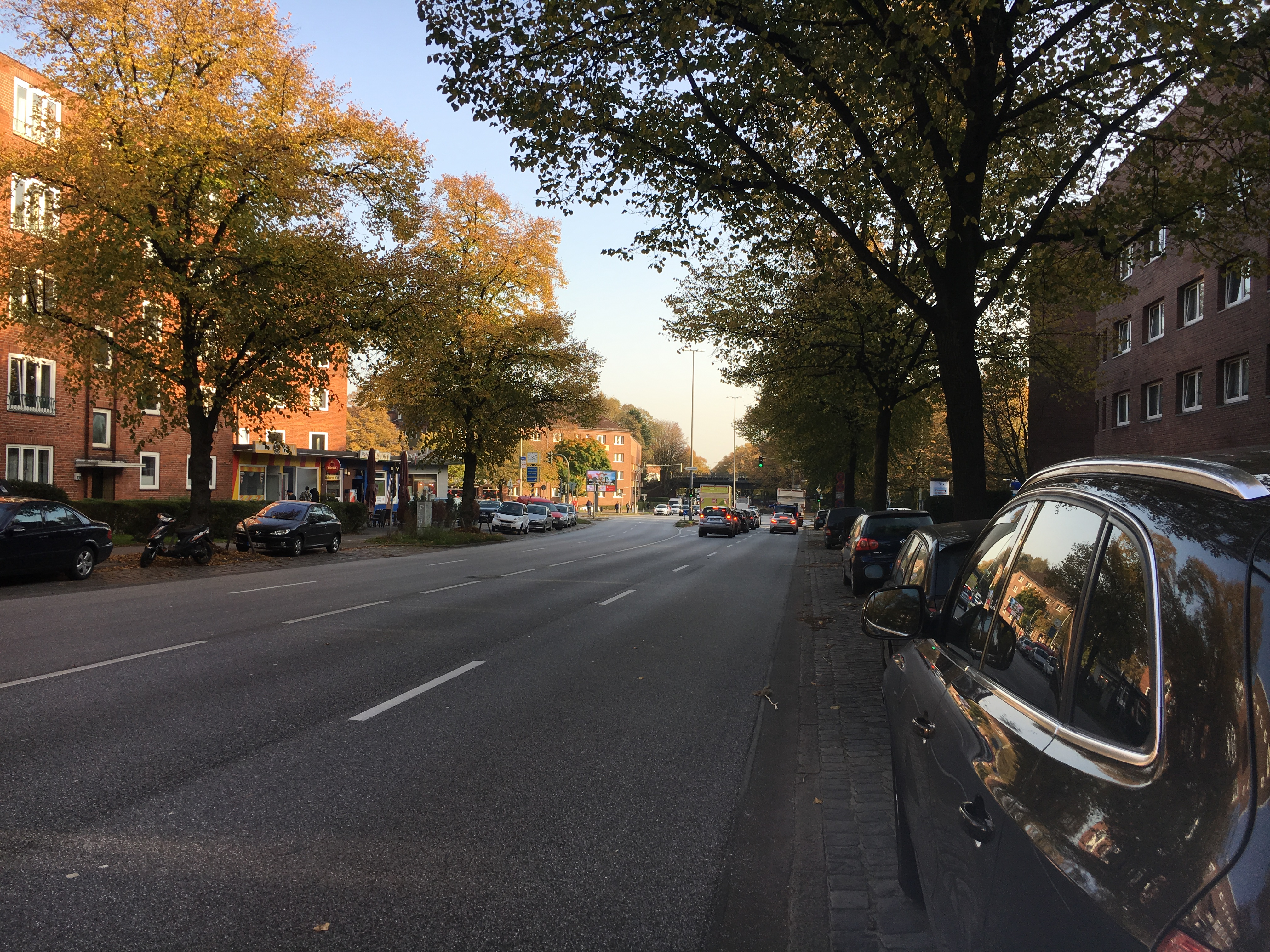 Habichtstraße, Blick auf die Kreuzung Steilshooper Straße, hinten mittig die Bahnbrücke der U 3, direkt links daran anschließend der Bahnhof Habichtstraße